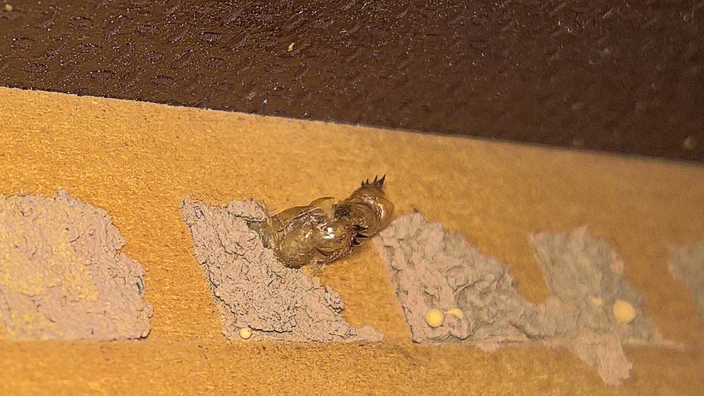 Exuvie Puppenhülle Trauerschwebers (Anthrax anthrax) 2017